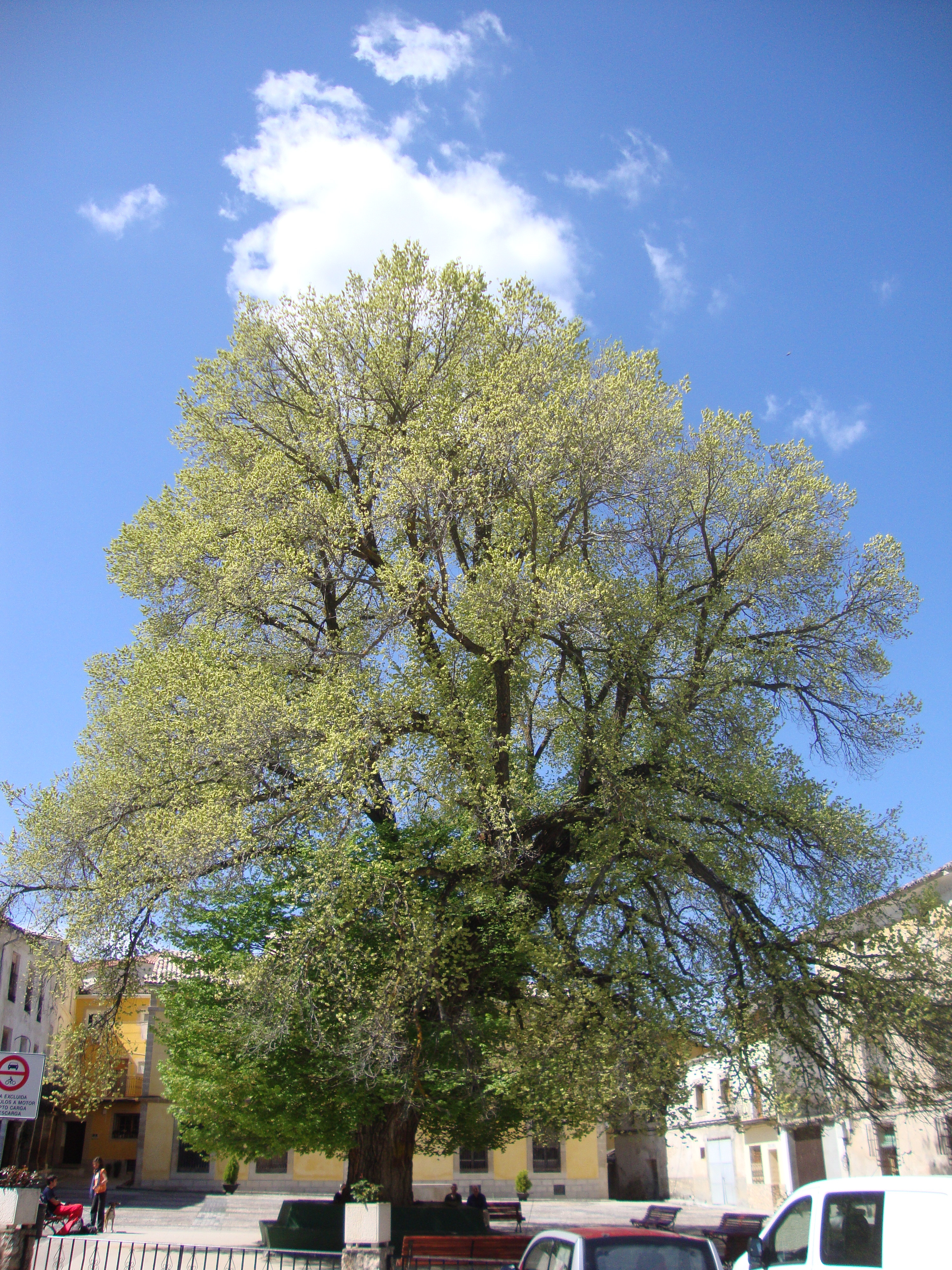 La Olma, árbol centenario de la localidad de Pareja (Guadalajara, España). Este árbol, ha sido remplazado por otro nuevo en 2015.